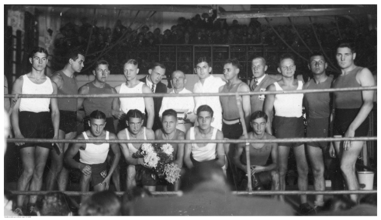 Fotografia grupowa drużyn WKS Śmigły Wilno (w ciemnych koszulkach) i Ogniska Wilno przed zawodami. Widoczny m.in. Romuald Sadowski